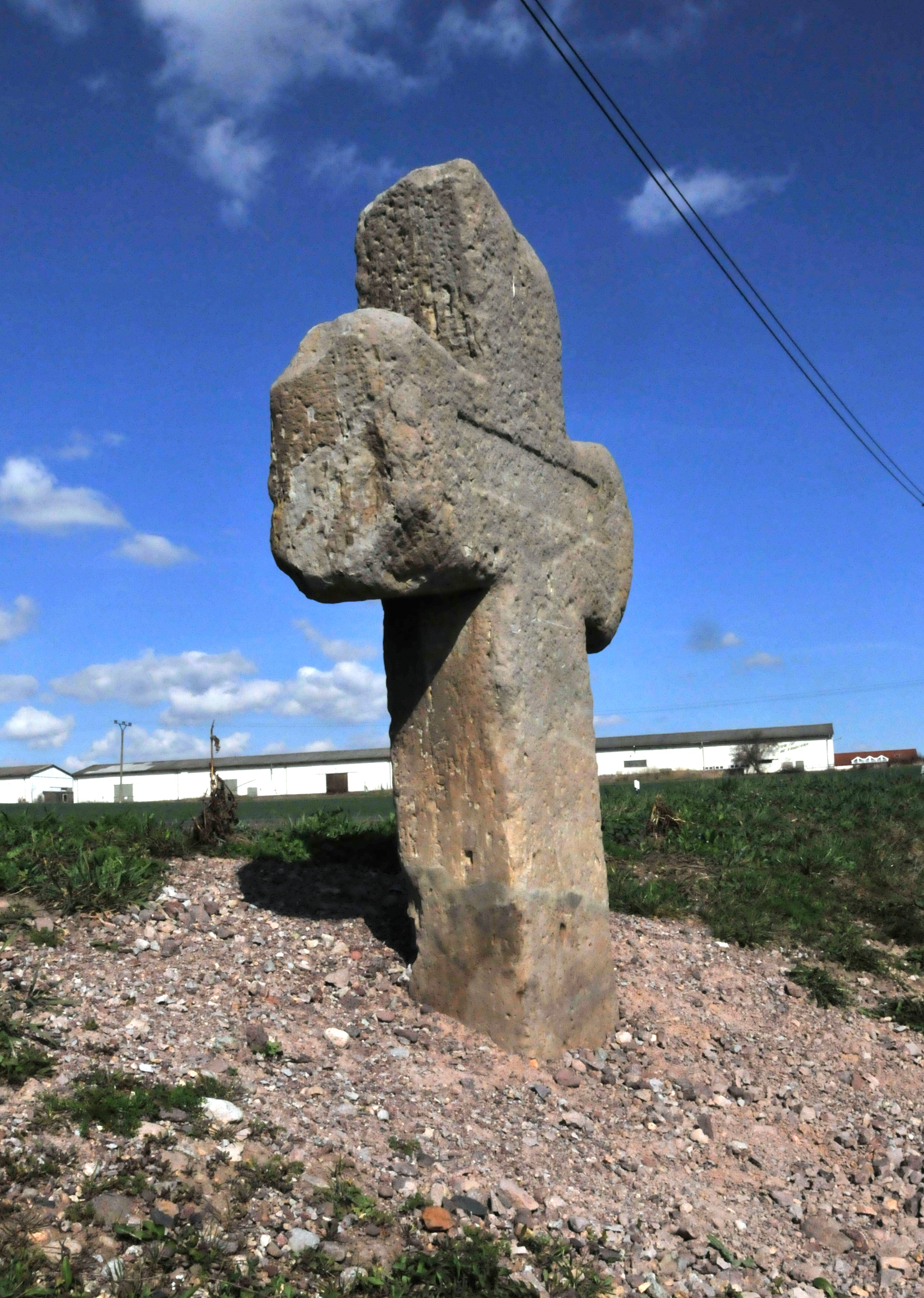 Freudentahl, das nördliche Steinkreuz